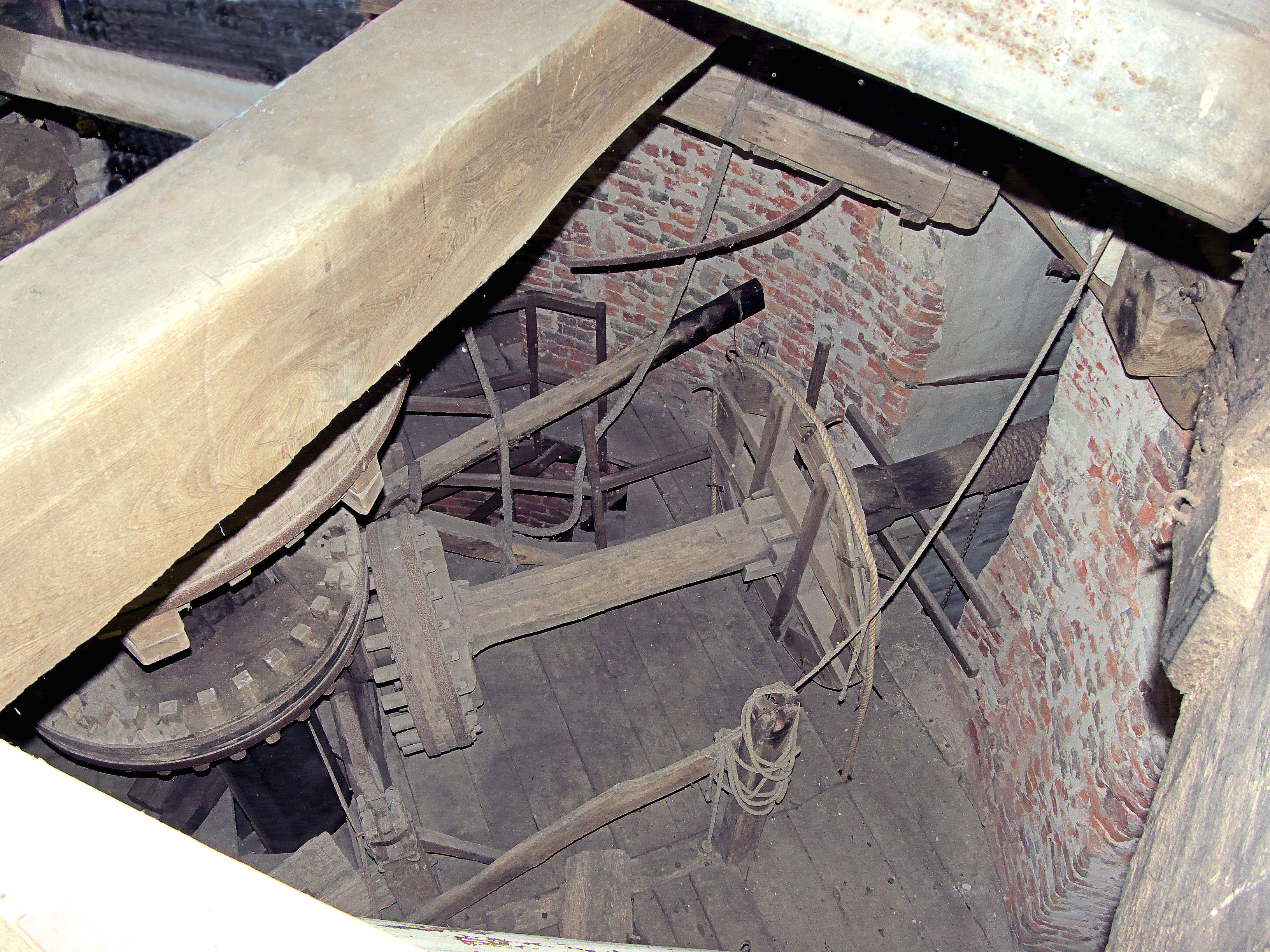 Molen Turmwindmühle Werth, Duitsland: luiwerk